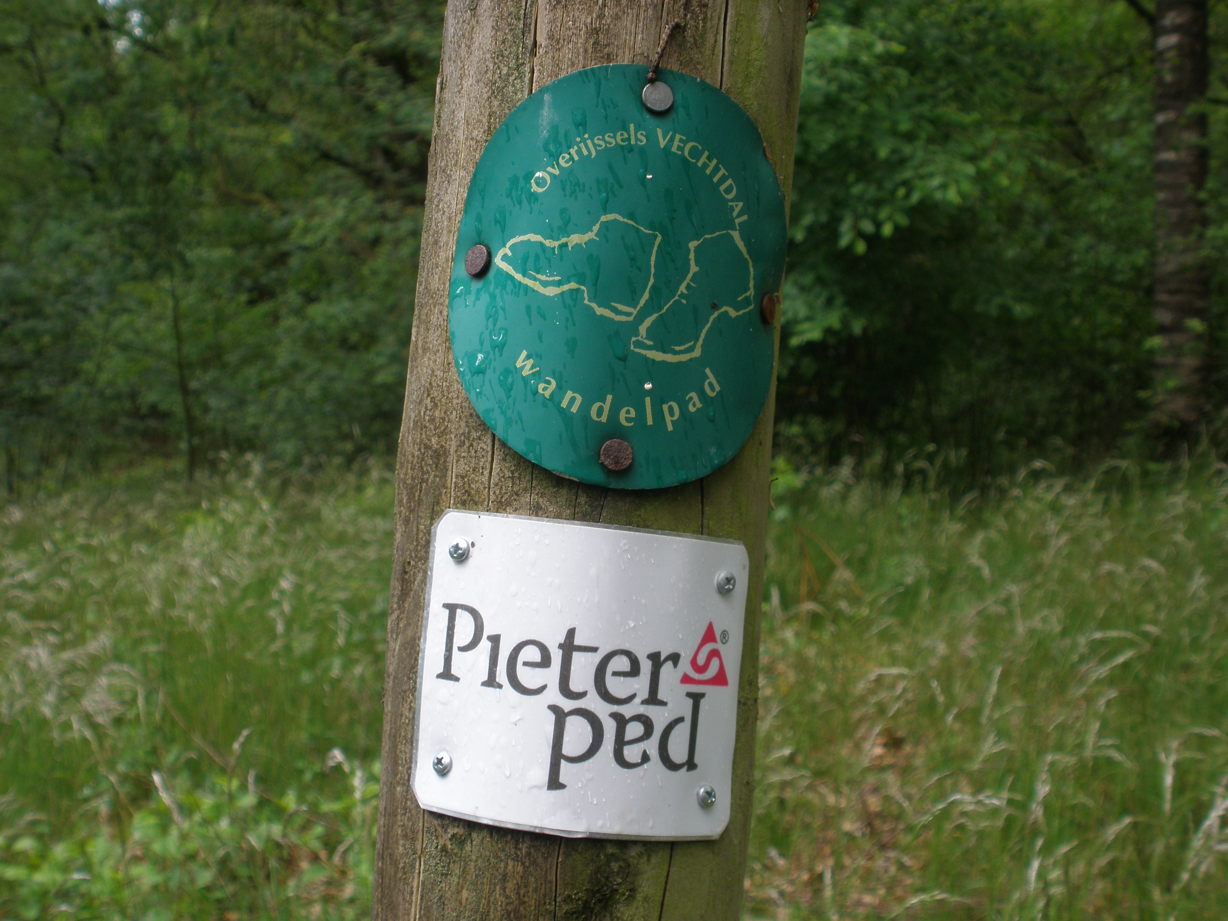 Bordje van het Pieterpad.